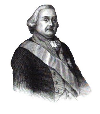 General Friedrich Adolf Riedesel, Freiherr zu Eisenbach